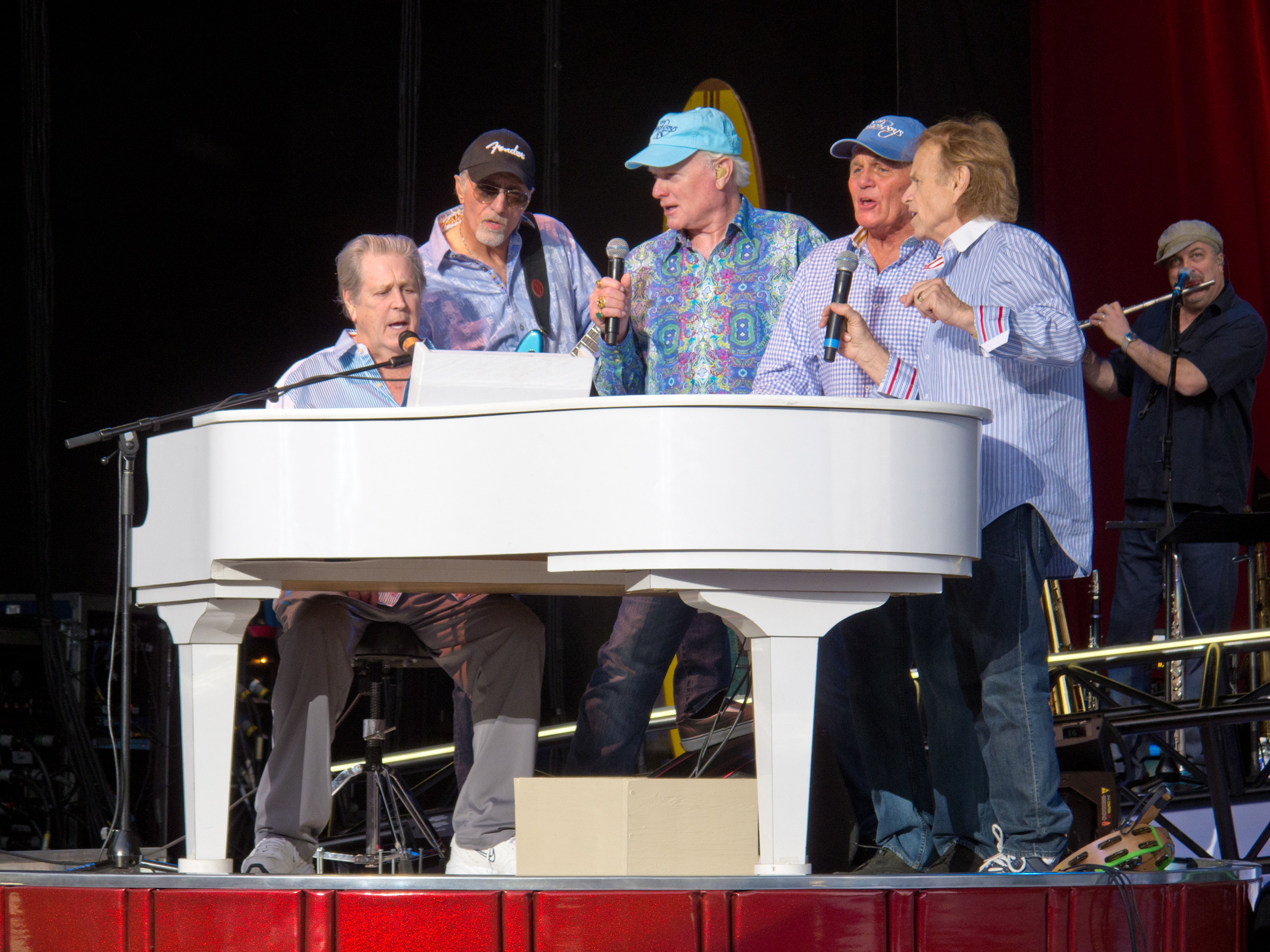 The Beach Boys cantando todos juntos en el piano blanco en el marco del 50 aniversario: (sentado) Brian Wilson, David Marks, Mike Love, Bruce Johsnton y Al Jardine. En el Santa Barbara Bowl (Santa Barbara, California).